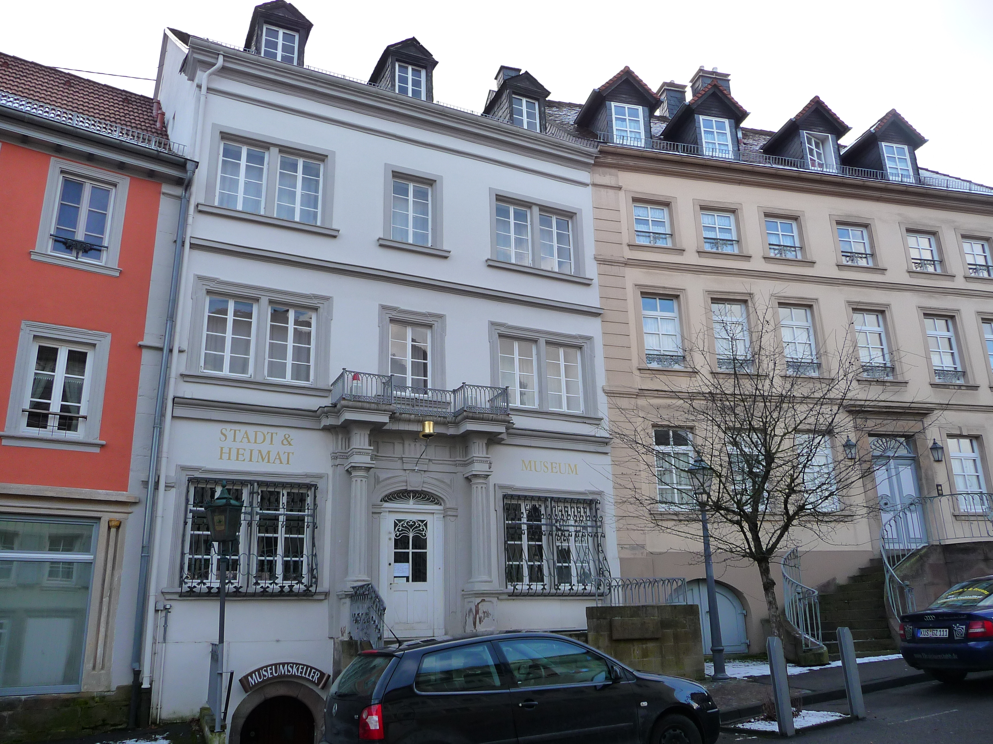 Stadt- und Heimatmuseum mit Fritz-Wunderlich-Zimmer in Kusel (Kreis Kusel, Deutschland)